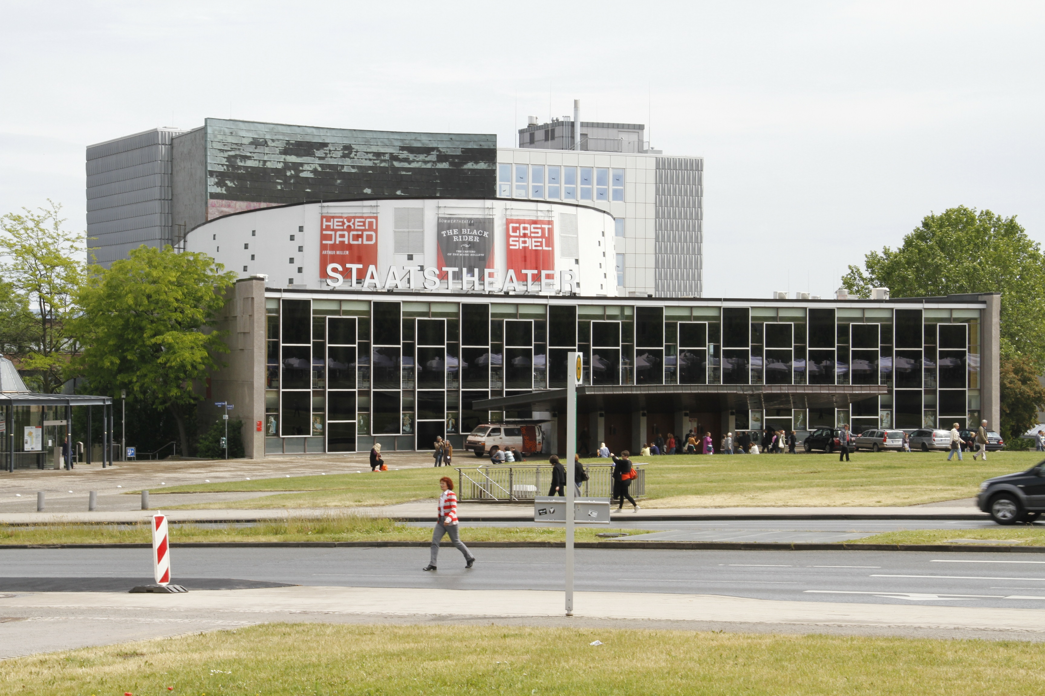 dOCUMENTA(13) Veranstaltungsgebäude Staatstheater